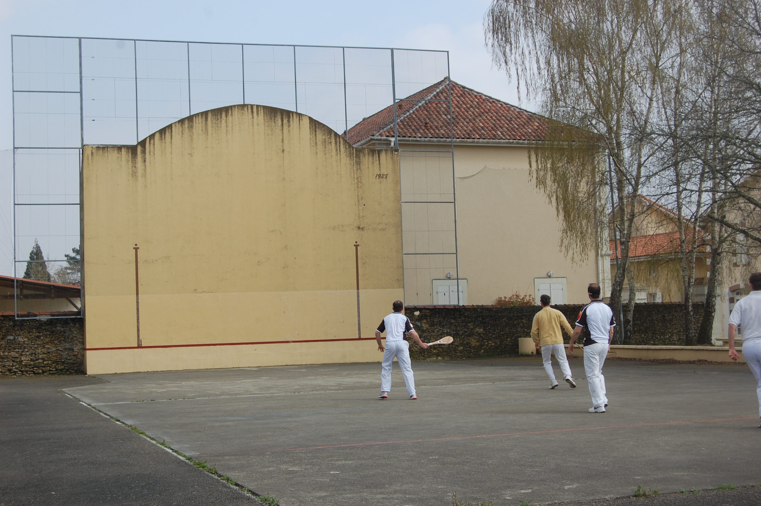 Fronton de Brocas où se déroule une partie de pelote.